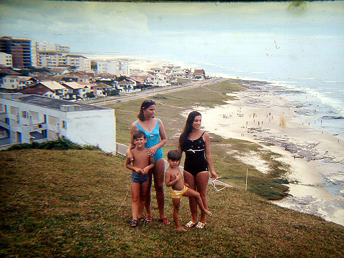 Família em Torres